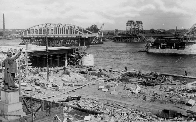 Строительство старого Володарского моста